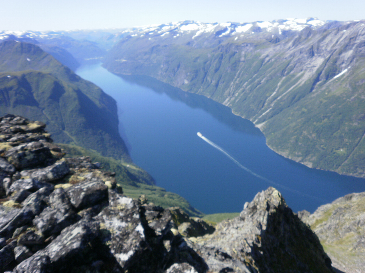 Fjord i Noreg